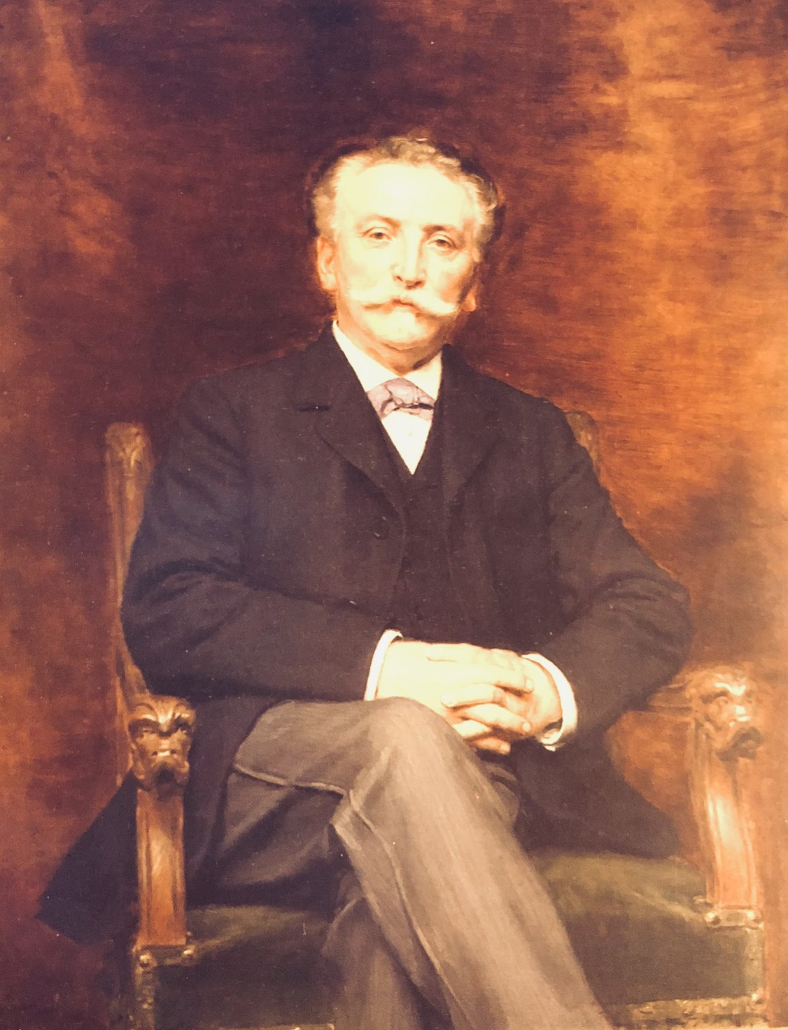 Charles Pollet-Duthoit sur toile de Rémi Cogghe, 1893.